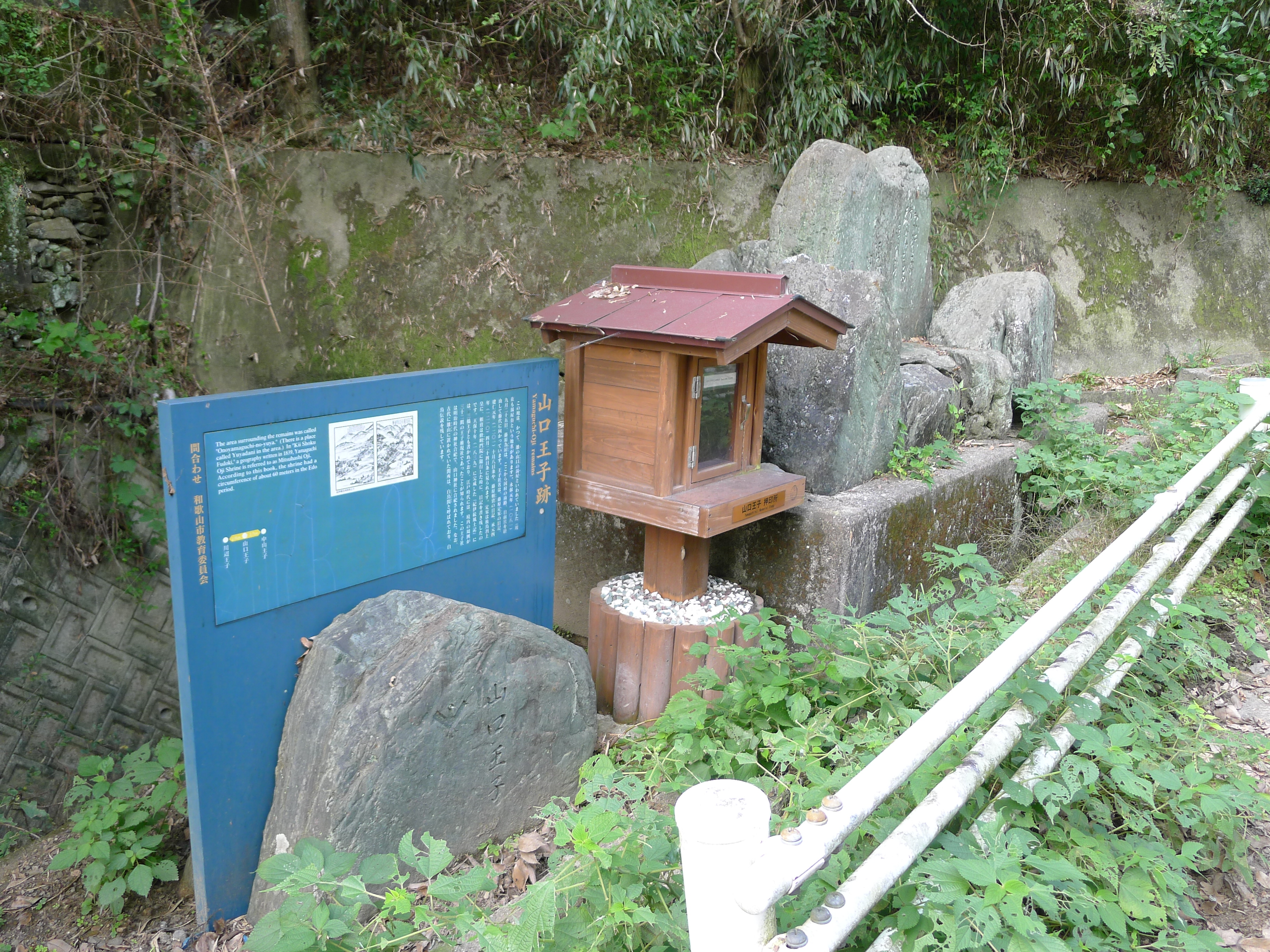 熊野古道・紀伊路の九十九王子の一つ山口王子（和歌山県和歌山市）